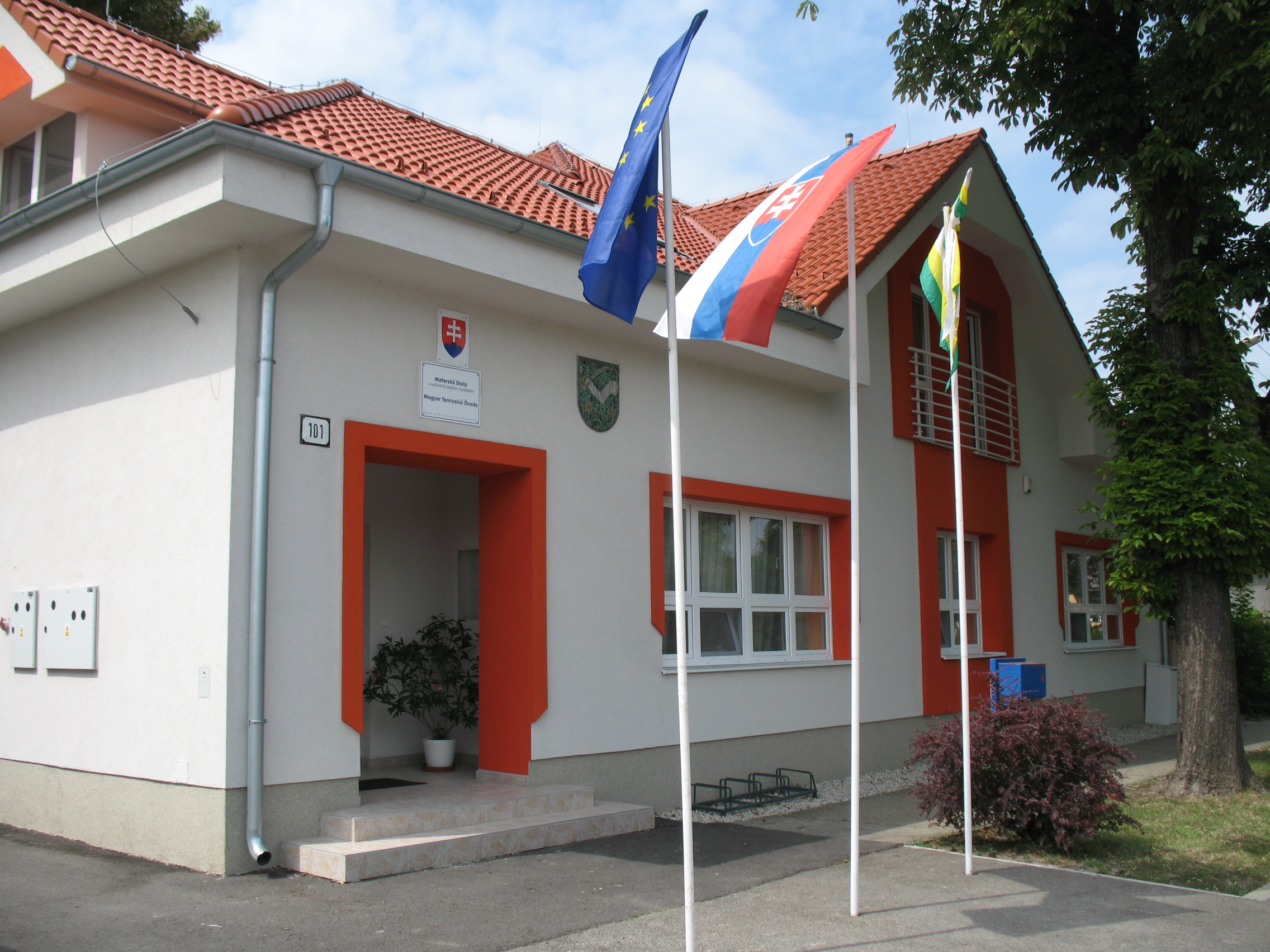 Nagyudvarnok